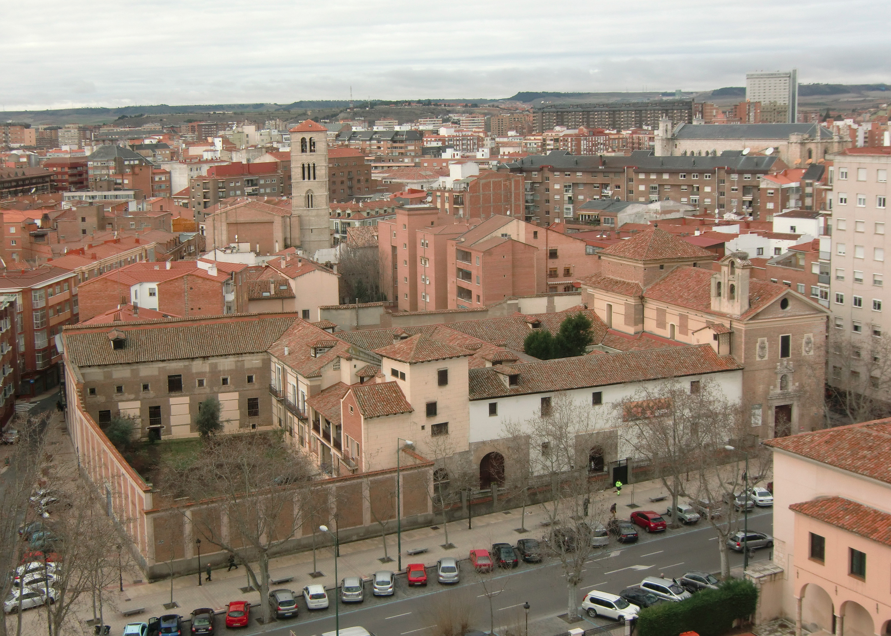 Convento de las Descalzas Reales y casa del licenciado Díaz de Figueroa, Valladolid. Detrás se ve la torre románica de la iglesia de San Martín.